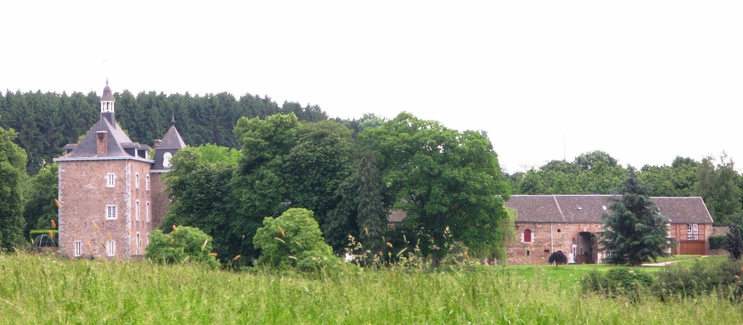 D'Schlass vu Wodémont vun der Kopp vun Neufchâteau aus gesinn, am Mee 2008.